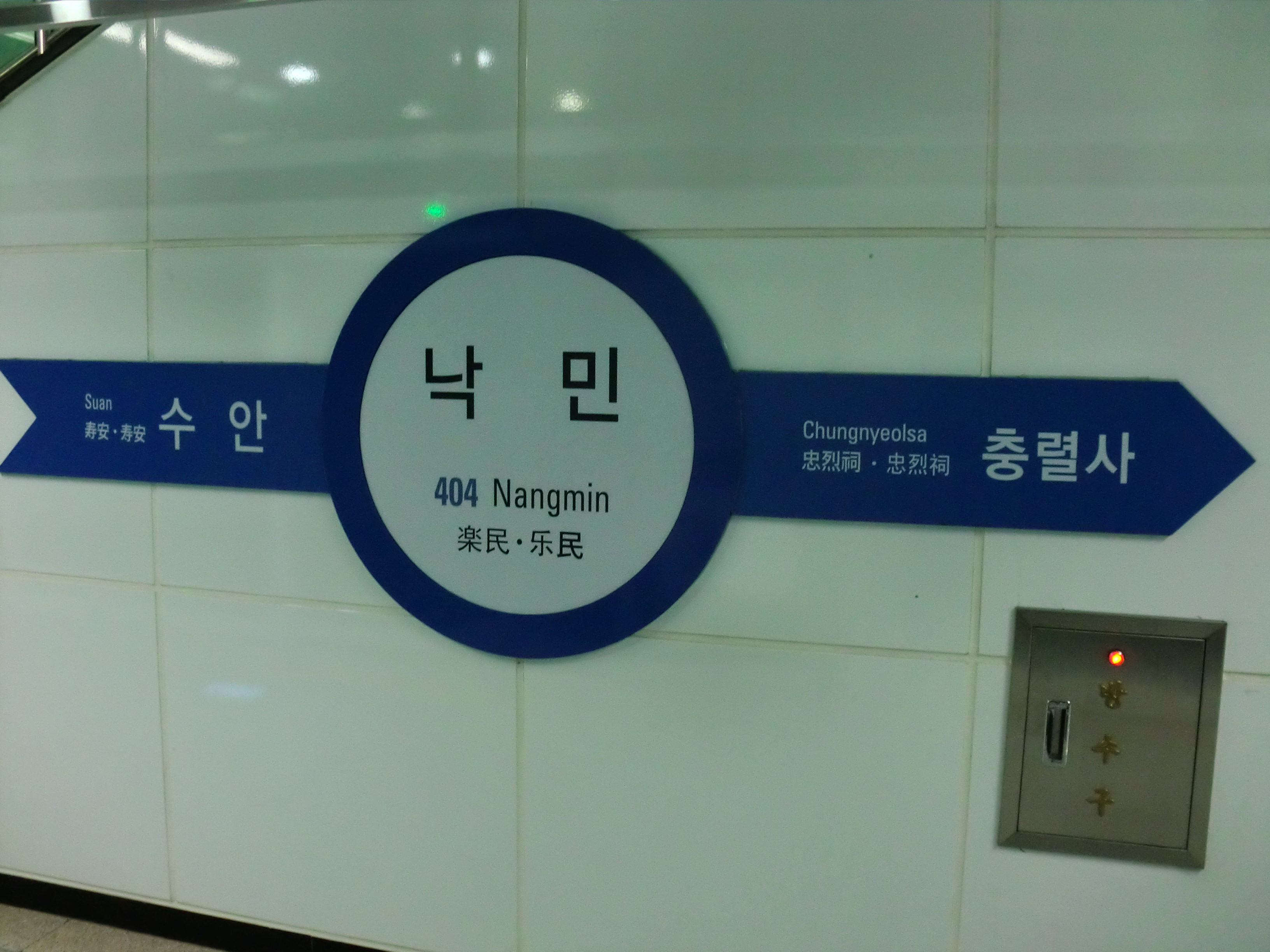 부산도시철도 4호선 낙민역의 역명판